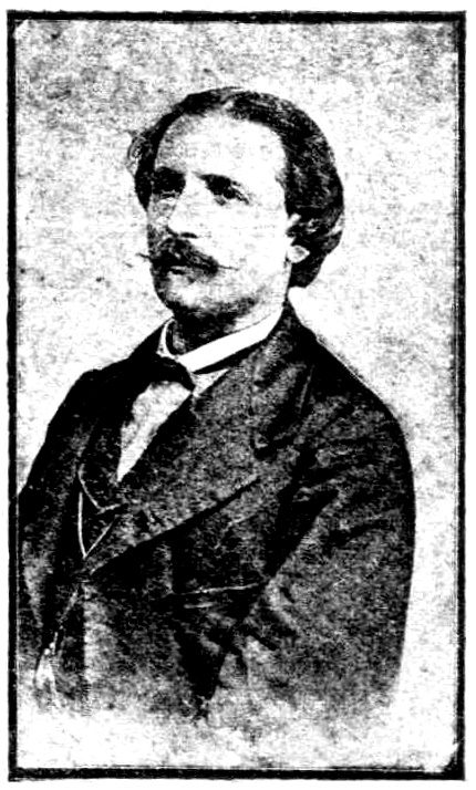 griechischer Schriftsteller oder Dichter, 19. Jahrhundert